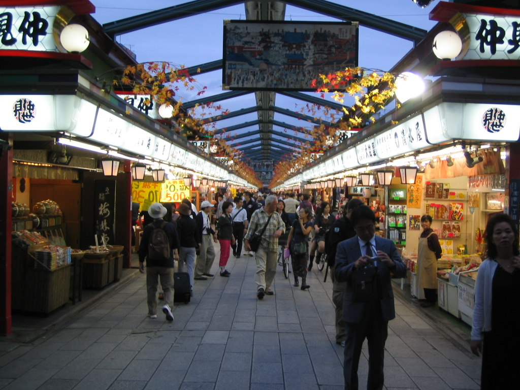 Nakemise dori in Tokyo